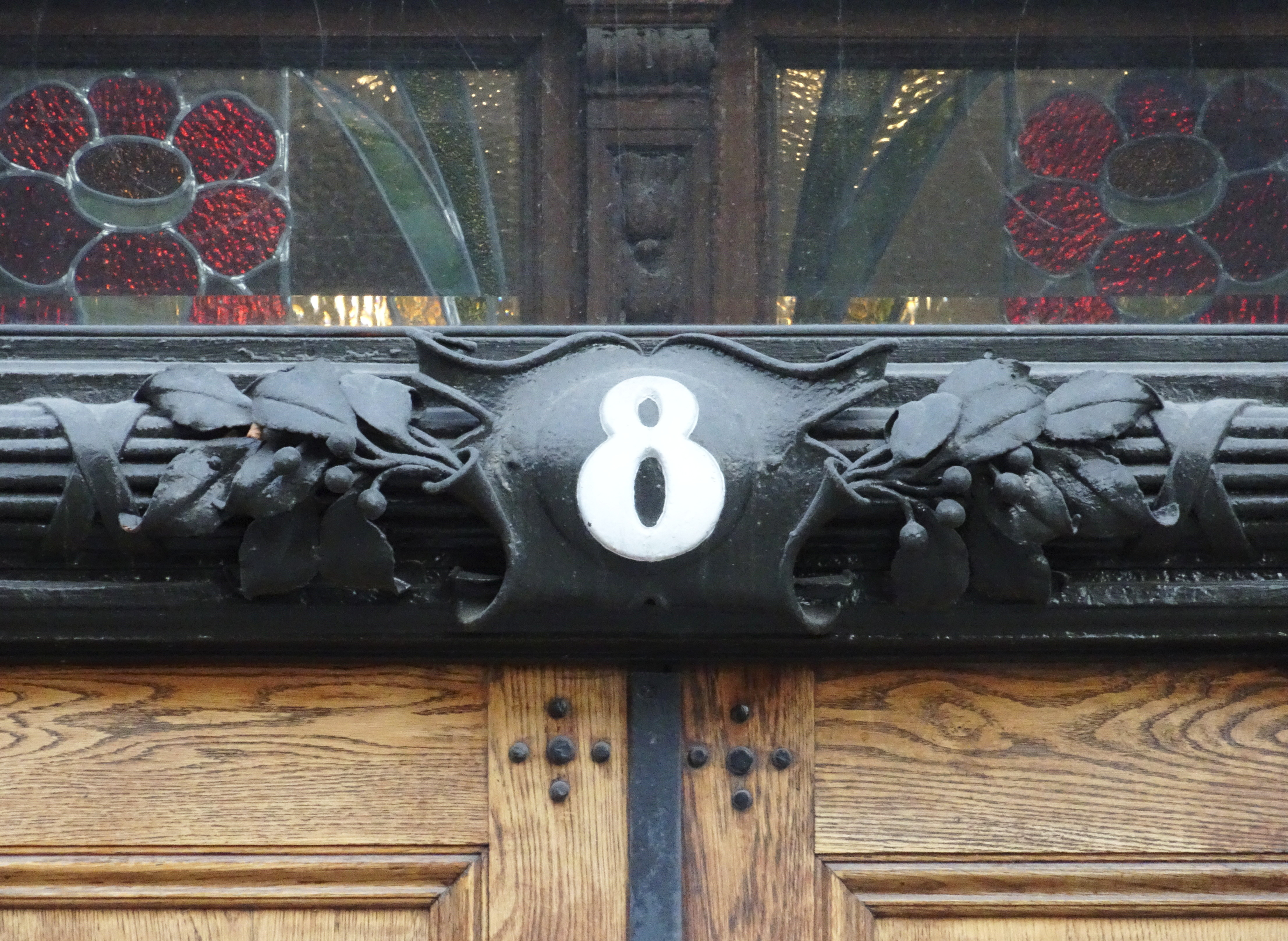 AB Separators kontorsbyggnad, fastigheten Klamparen 8, Fleminggatan 8